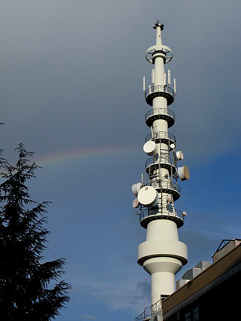 Photo: Baltasar García S